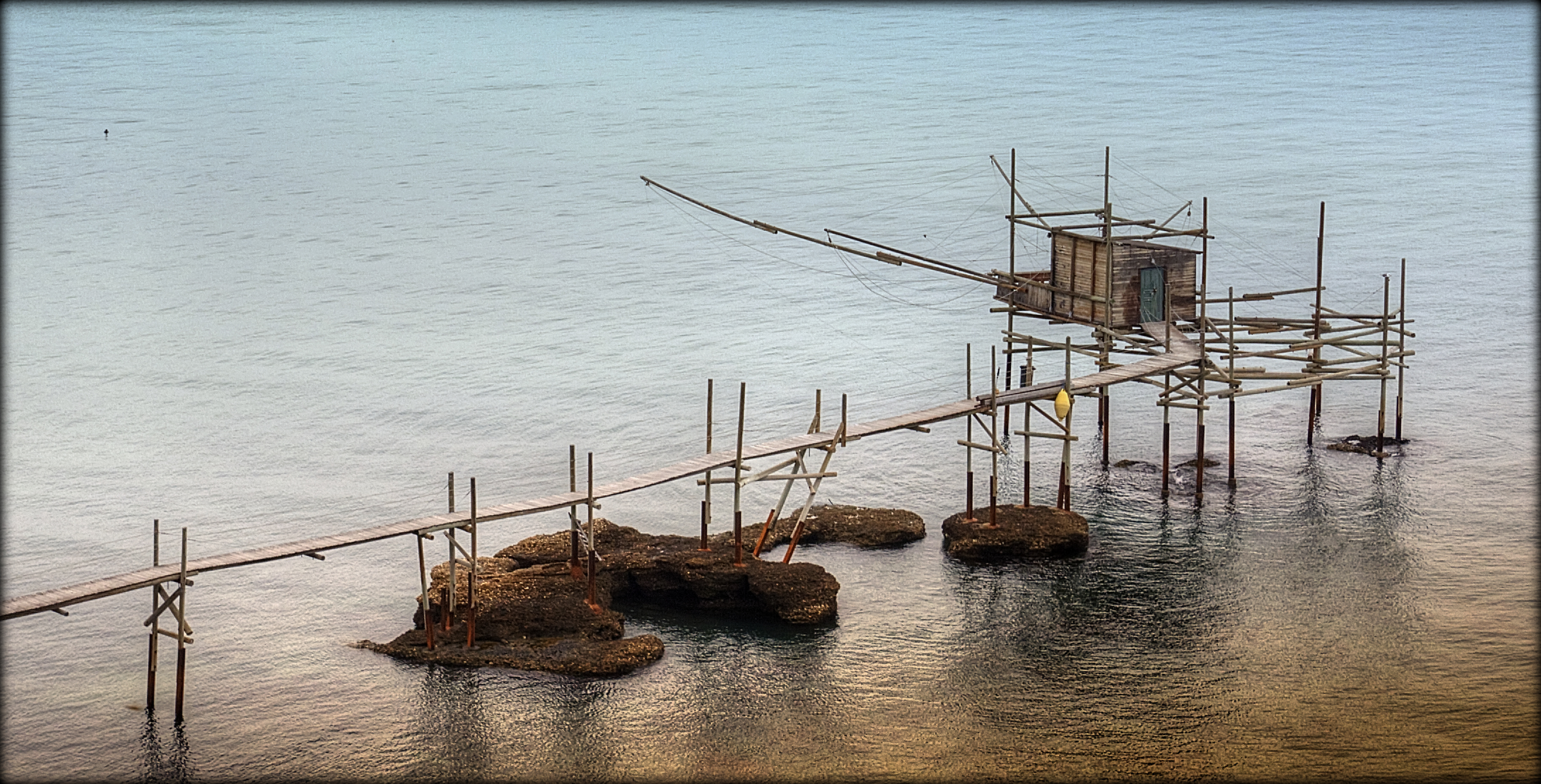 Trabocchi Abruzzo Adriatico